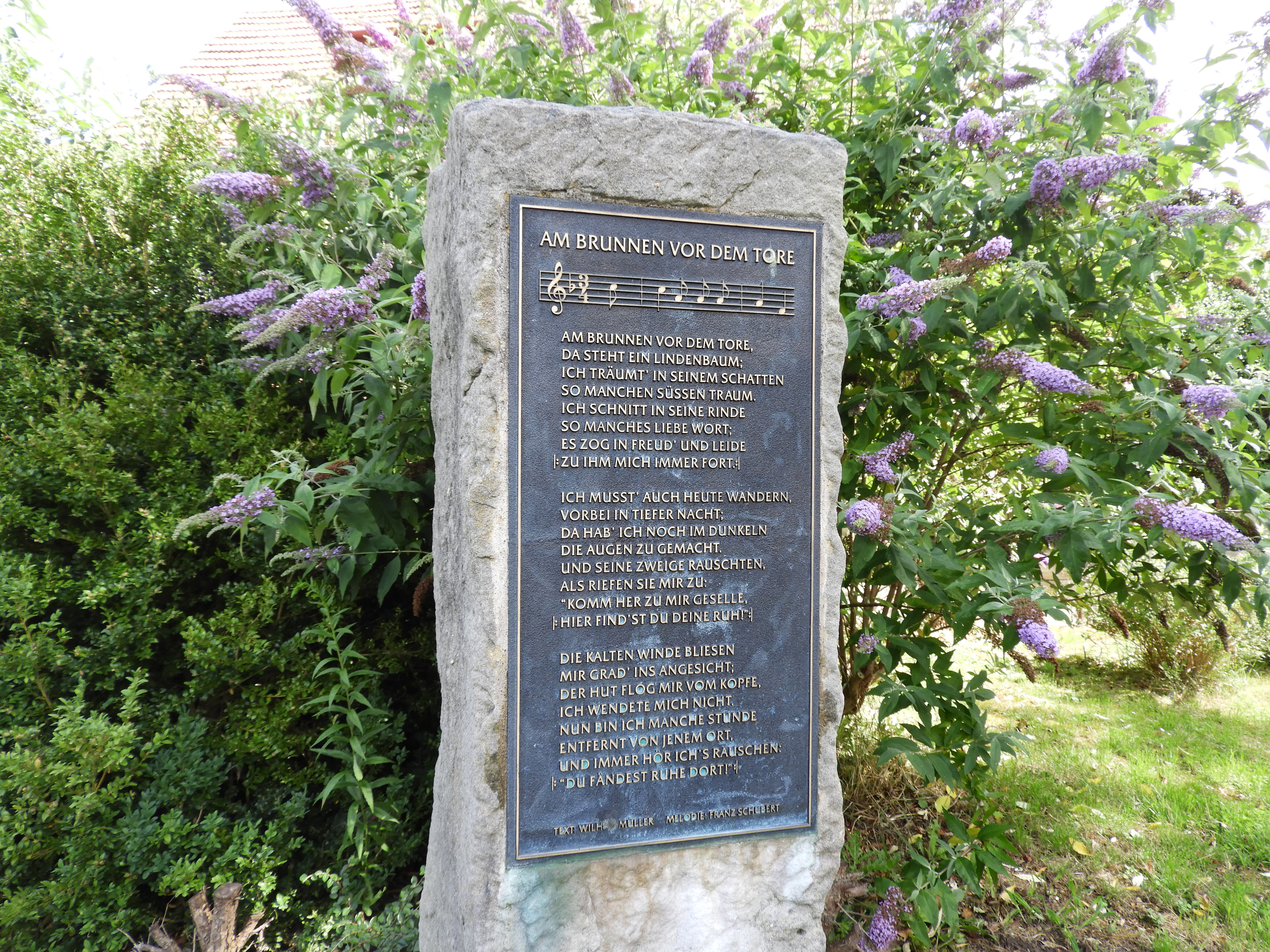 Inschrifttafel mit dem Text „Am Brunnen vor dem Tore“. Inspiriert von der „Linde am Brunnen vor dem Tore“ im nordhessischen Bad Sooden-Allendorf soll Wilhelm Müller, so wird überliefert, das Gedicht „Der Lindenbaum“ geschrieben haben. Berühmt wurden die Verse als „Am Brunnen vor dem Tore“ durch die Vertonung von Franz Schubert und durch die Bearbeitung von Friedrich Silcher. Die fast 700 Jahre alt gewordene „Original“-Linde fiel im Mai 1912 einem Sturm zum Opfer. Im Jahr 1914 wurde eine neue Linde an ihrer Stelle gepflanzt, die inzwischen stattliche Ausmaße erreicht hat. Der Baum steht seit 1936 als Naturdenkmal mit der Nummer ND 636.008 unter besonderem Schutz und gehört zu einer als Kulturdenkmal aus geschichtlichen Gründen geschützten Anlage.